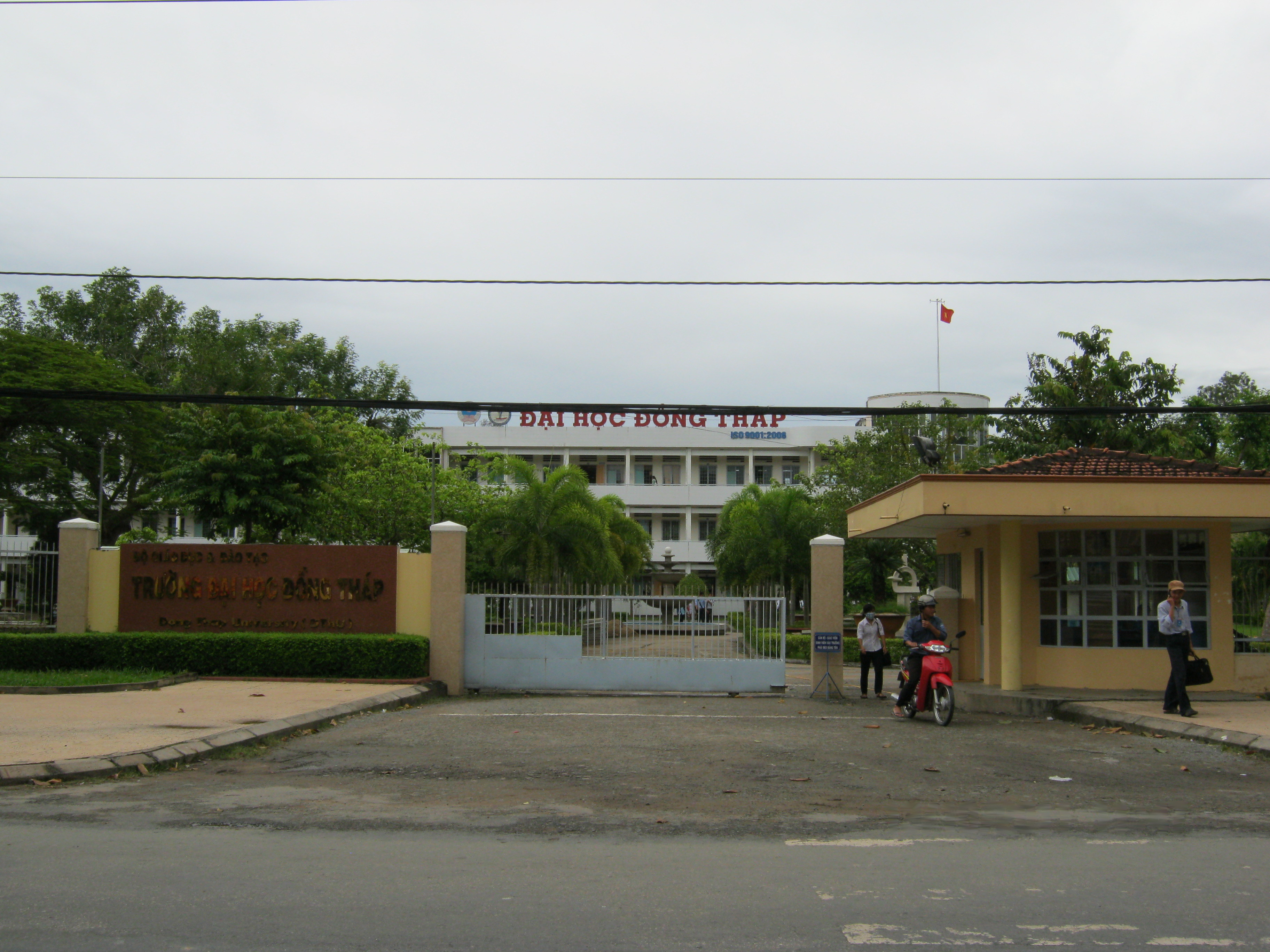 Trường Đại học tỉnh Đồng Tháp, Việt Nam.